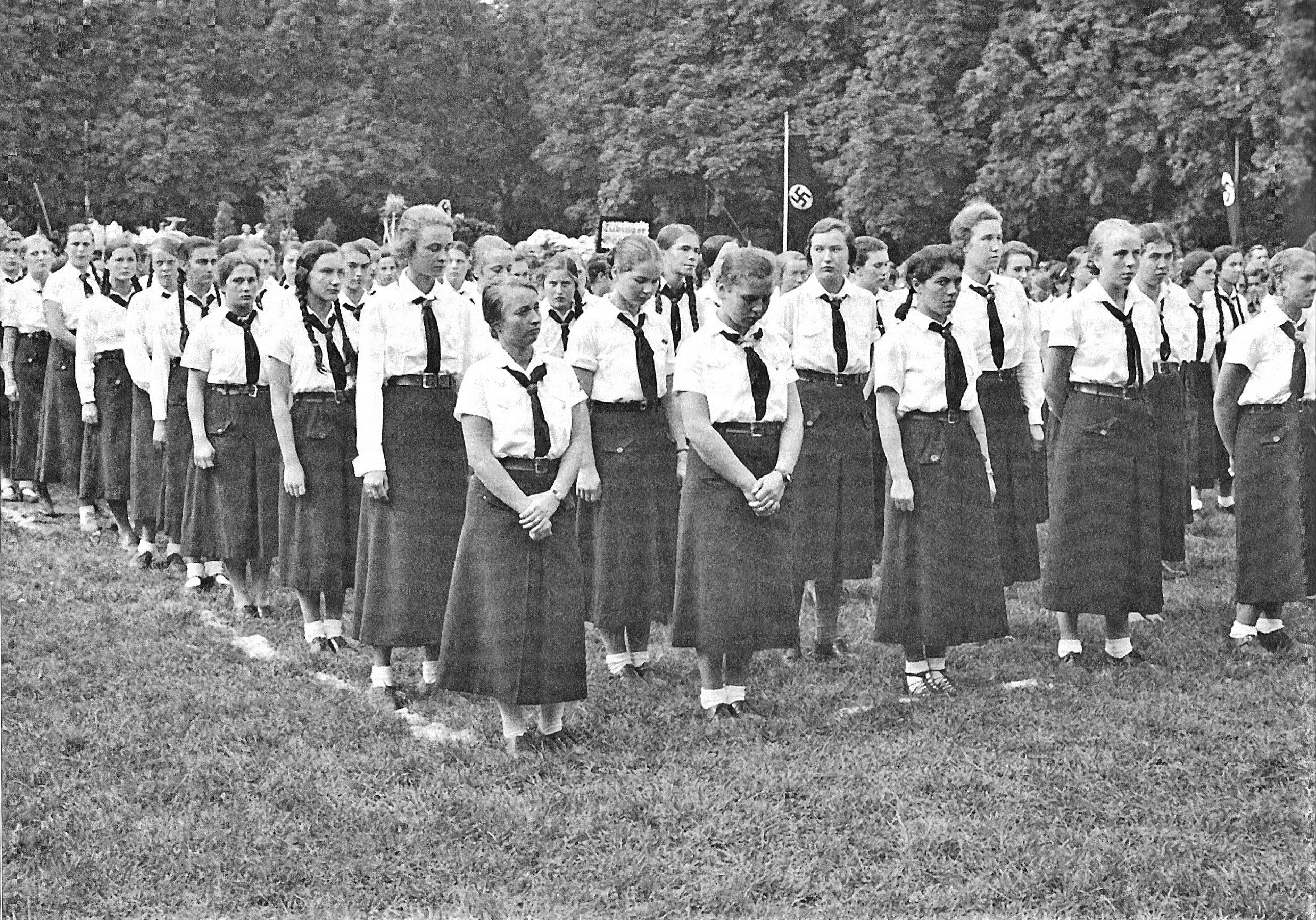 Bund Deutscher Mädel, Gau Tübingen auf dem Bahnhofsvorplatz (heute Europaplatz) bei der Kundgebung zum Erntedankfest.